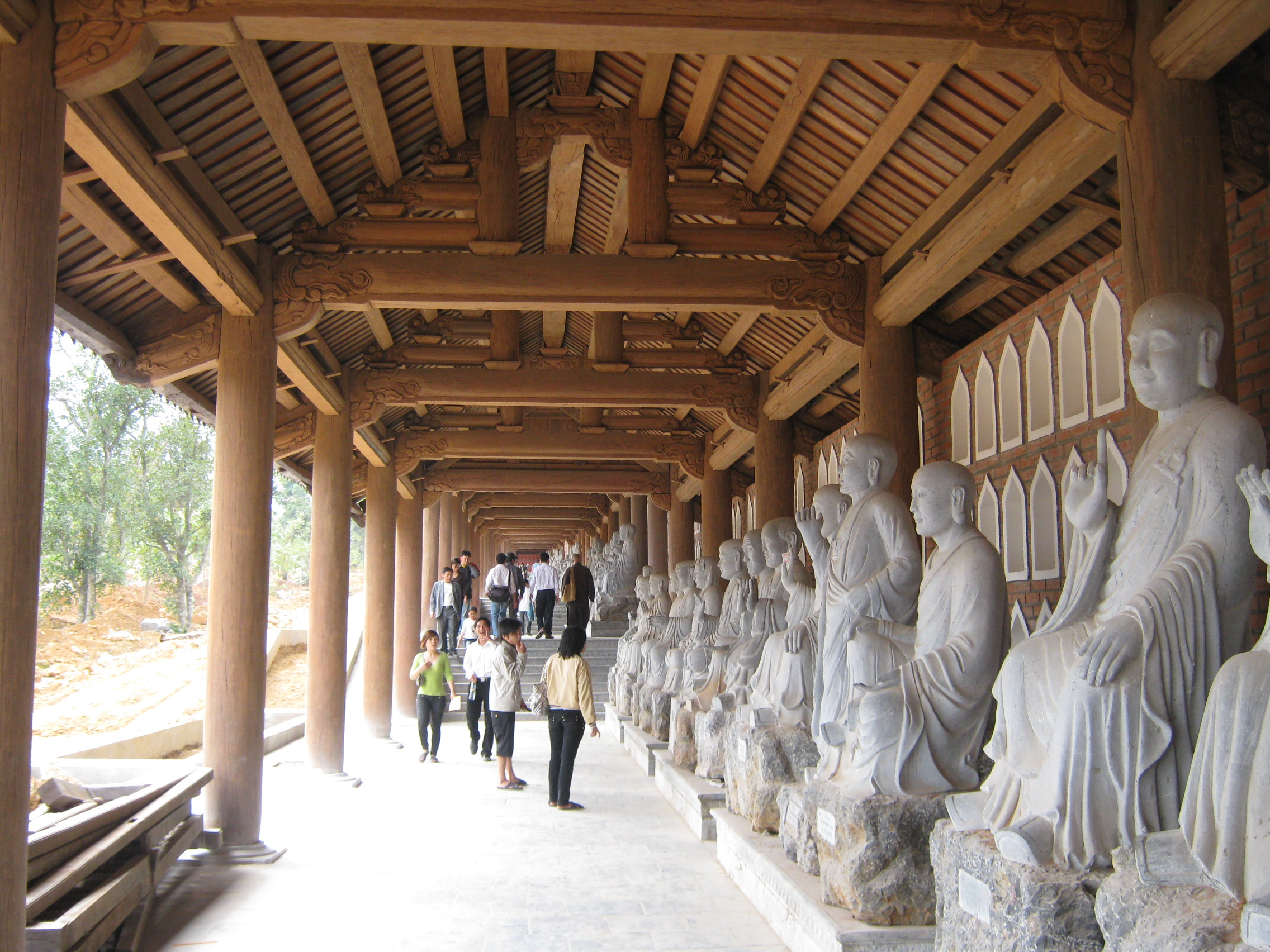 Hàng lang La Hán ở chùa Bái Đính tỉnh Ninh Bình